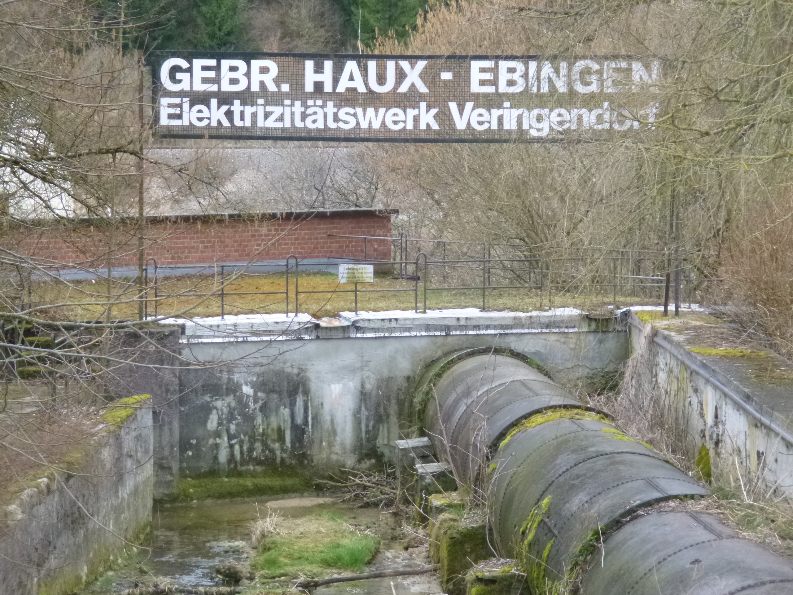 Lauchert Wasserkraftwerk Veringendorf